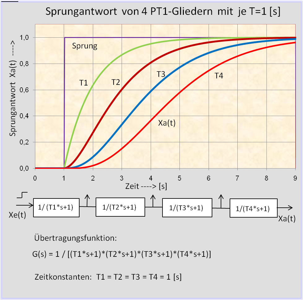 Sprungantwort von 4 in Reihe geschalteten PT1-Gliedern